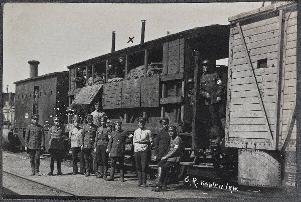 Laiarööpmeline soomusrong "Kapten Irv", esialgne kuulipildujavagun ühes oma meeskonnaga, kevad 1919.